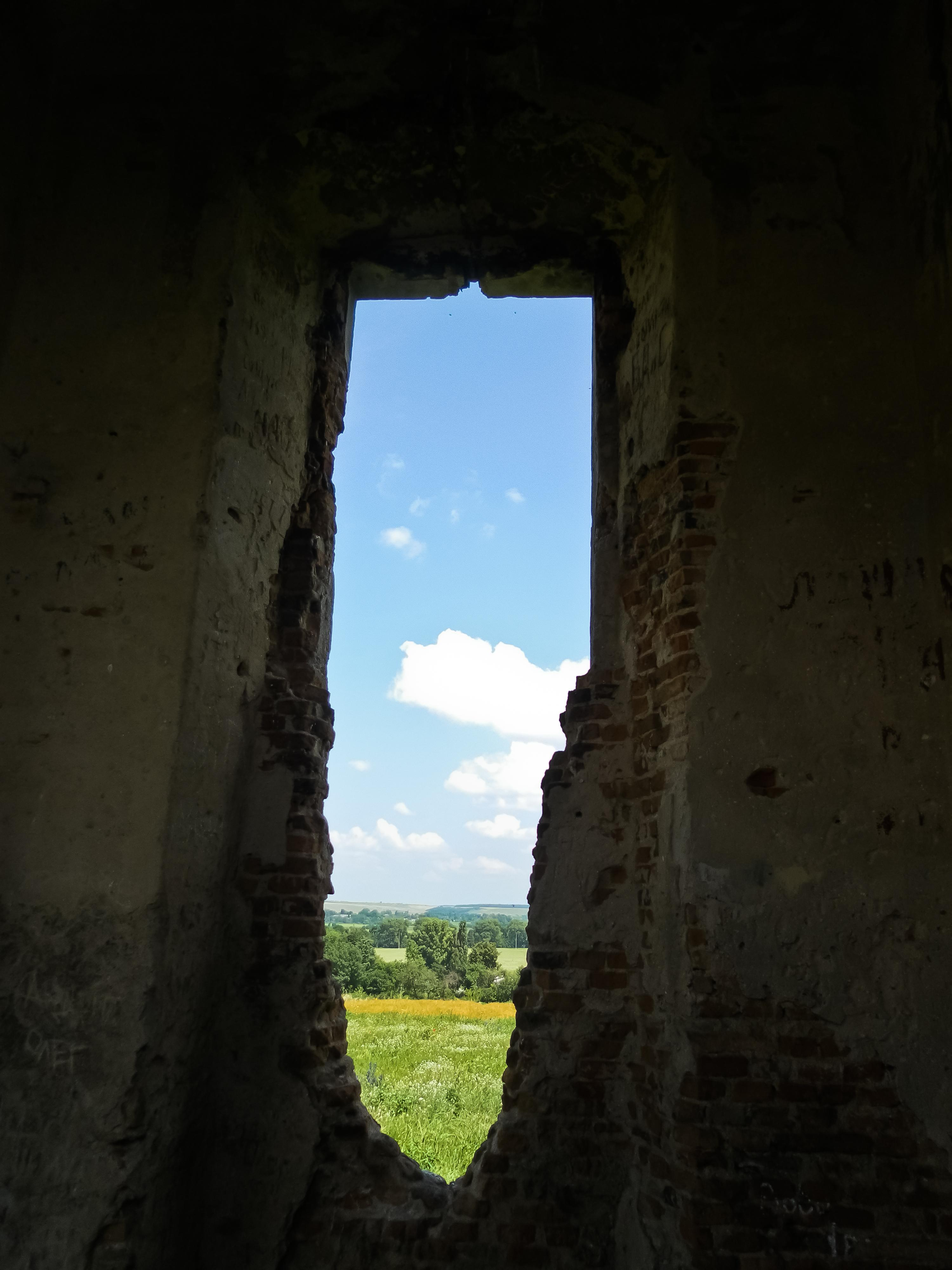 Вежа-каплиця аріанська (соцініанська), село Тихомель